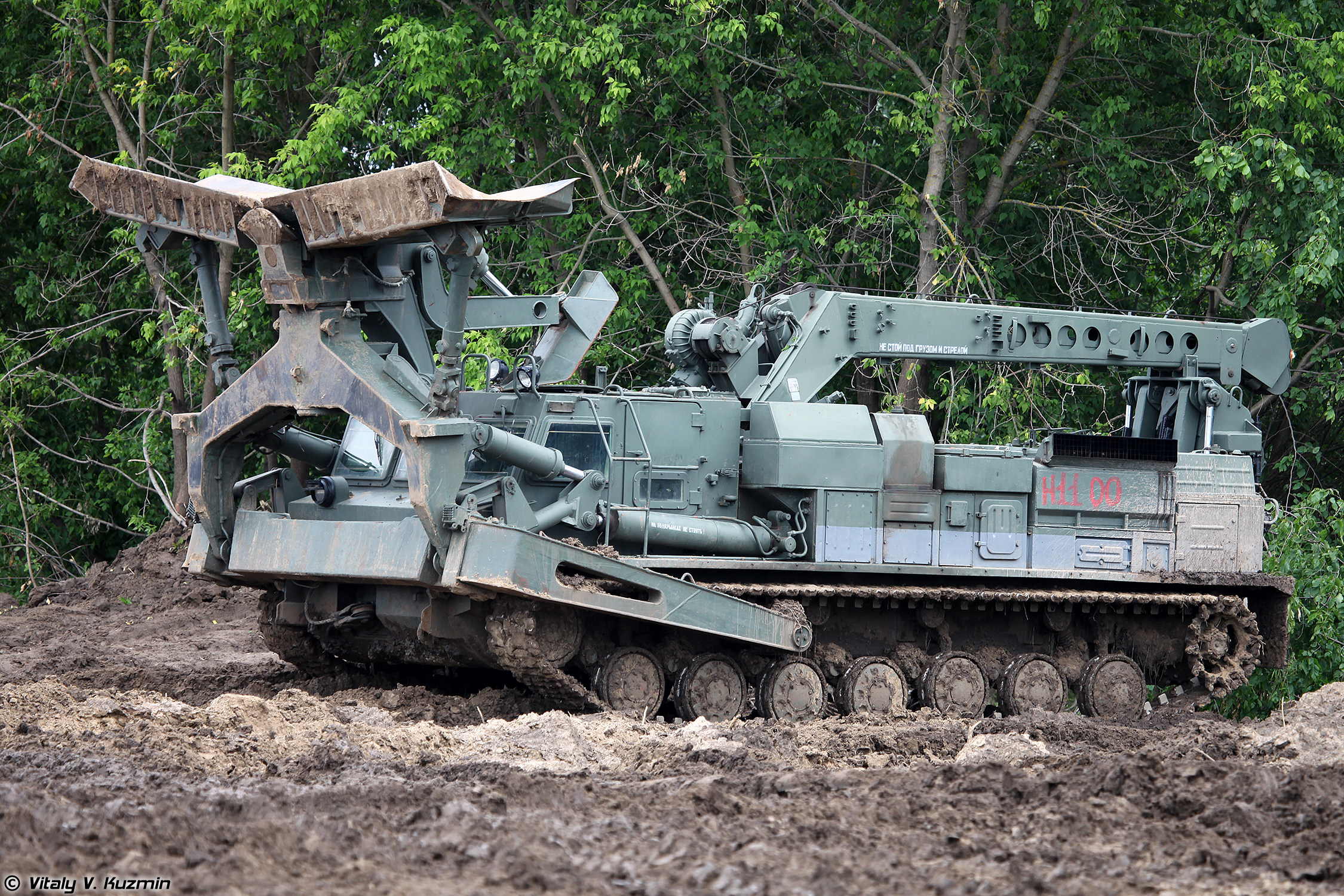 Путепрокладчик БАТ-2 (BAT-2 combat engineering vehicle)